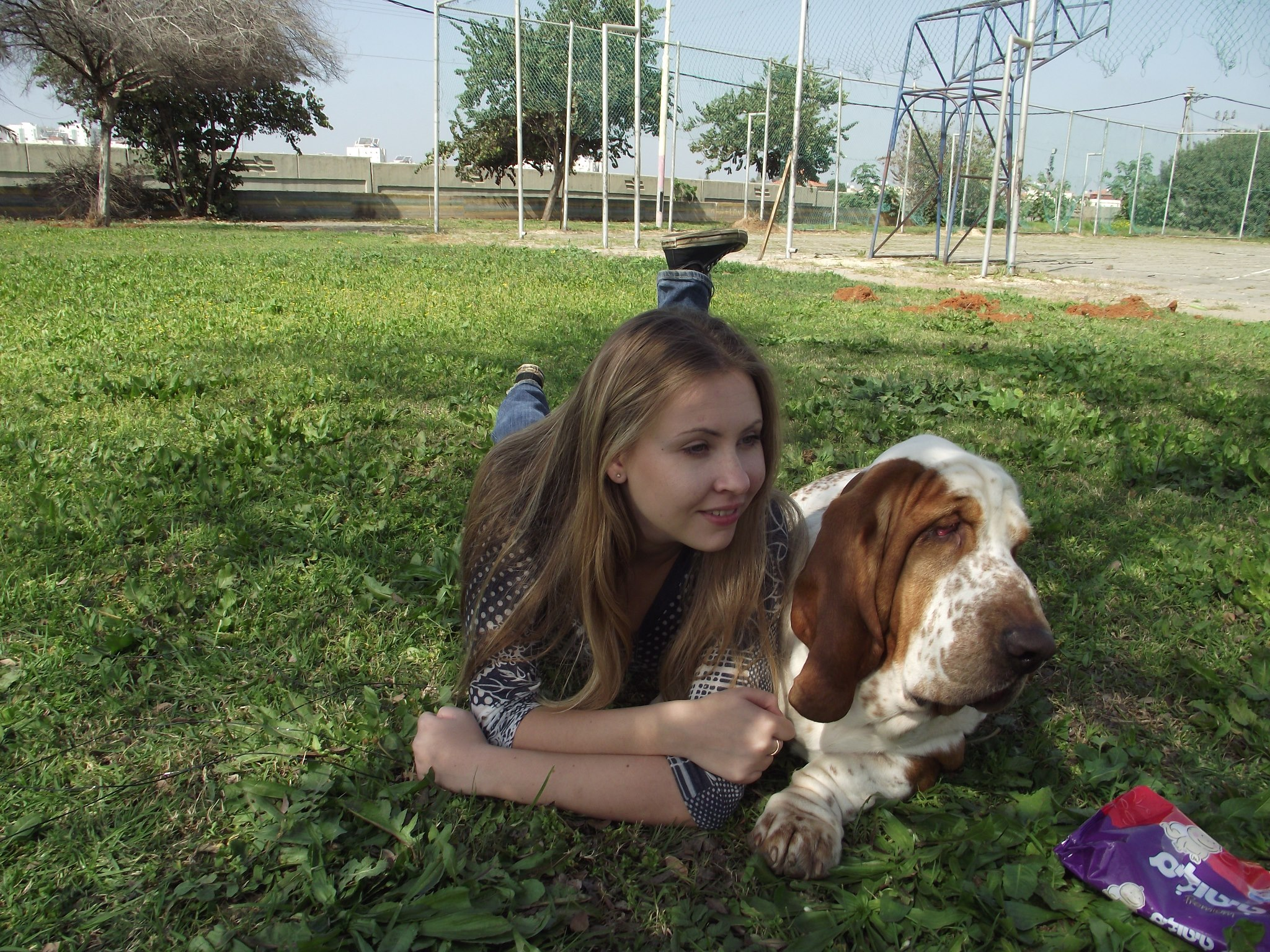 Yana Shchukin and her dog Viking Nepobedimii